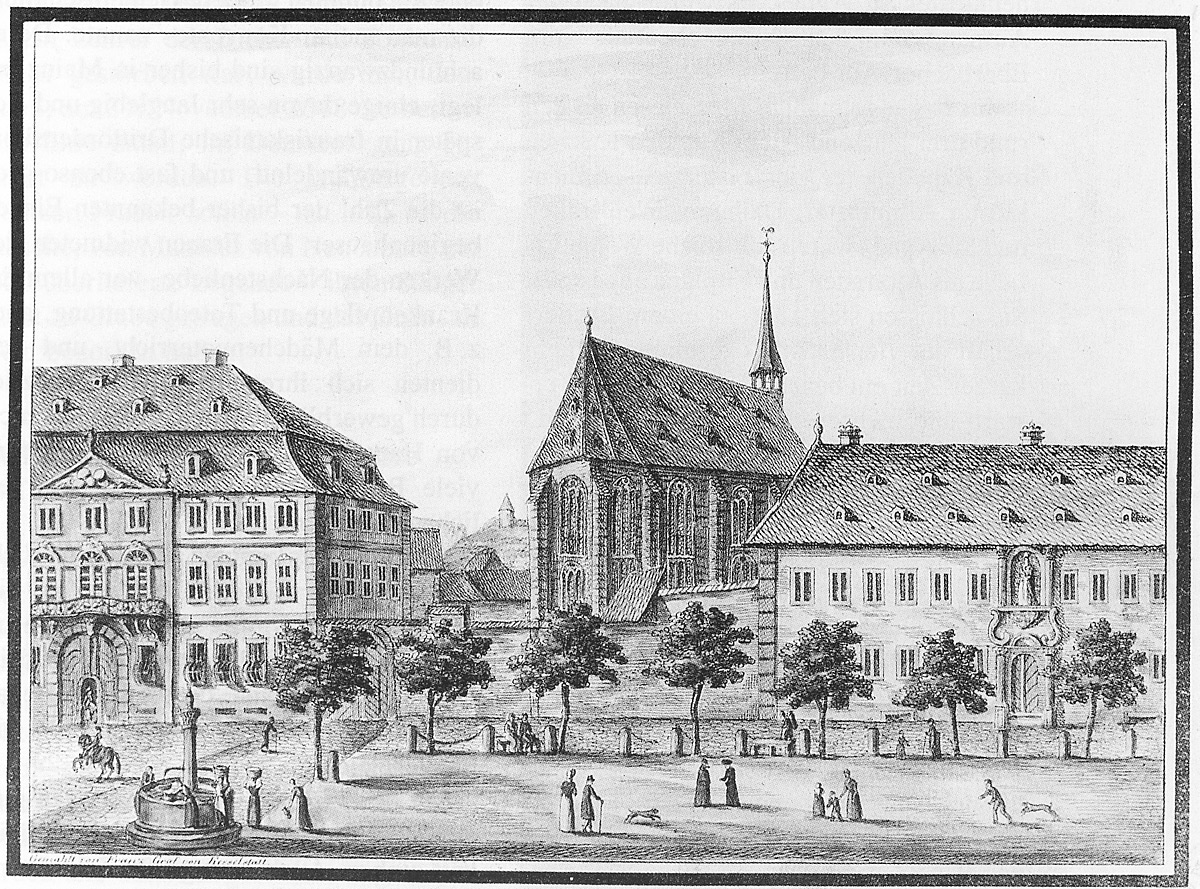 Blick vom Thiermarkt auf das Weissfrauenkloster mit Äbtissinnenbau (rechts) und dem angrenzenden Bassenheimer Hof (links)